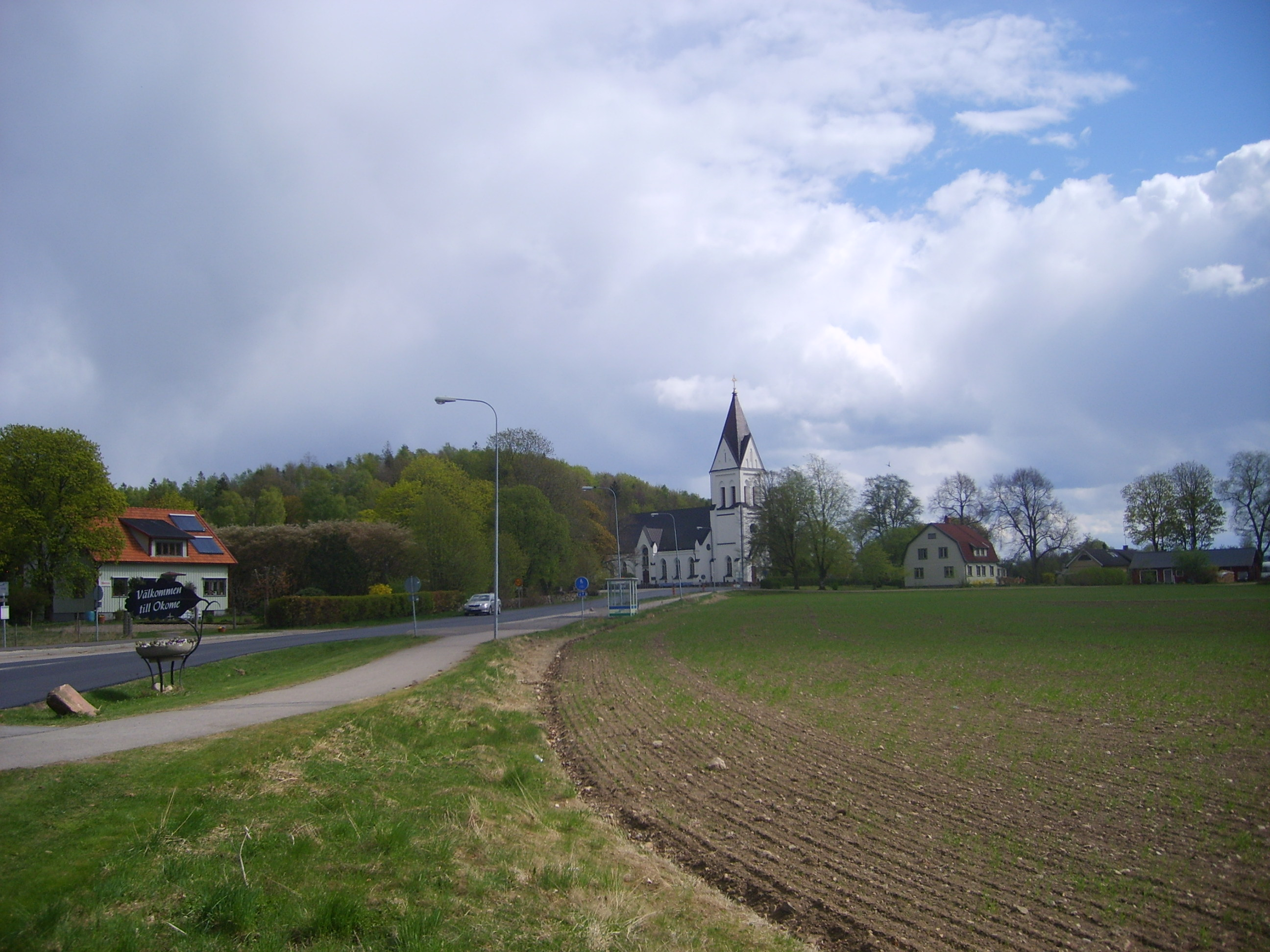 Panorama of Okome outside Falkenberg, Sweden.